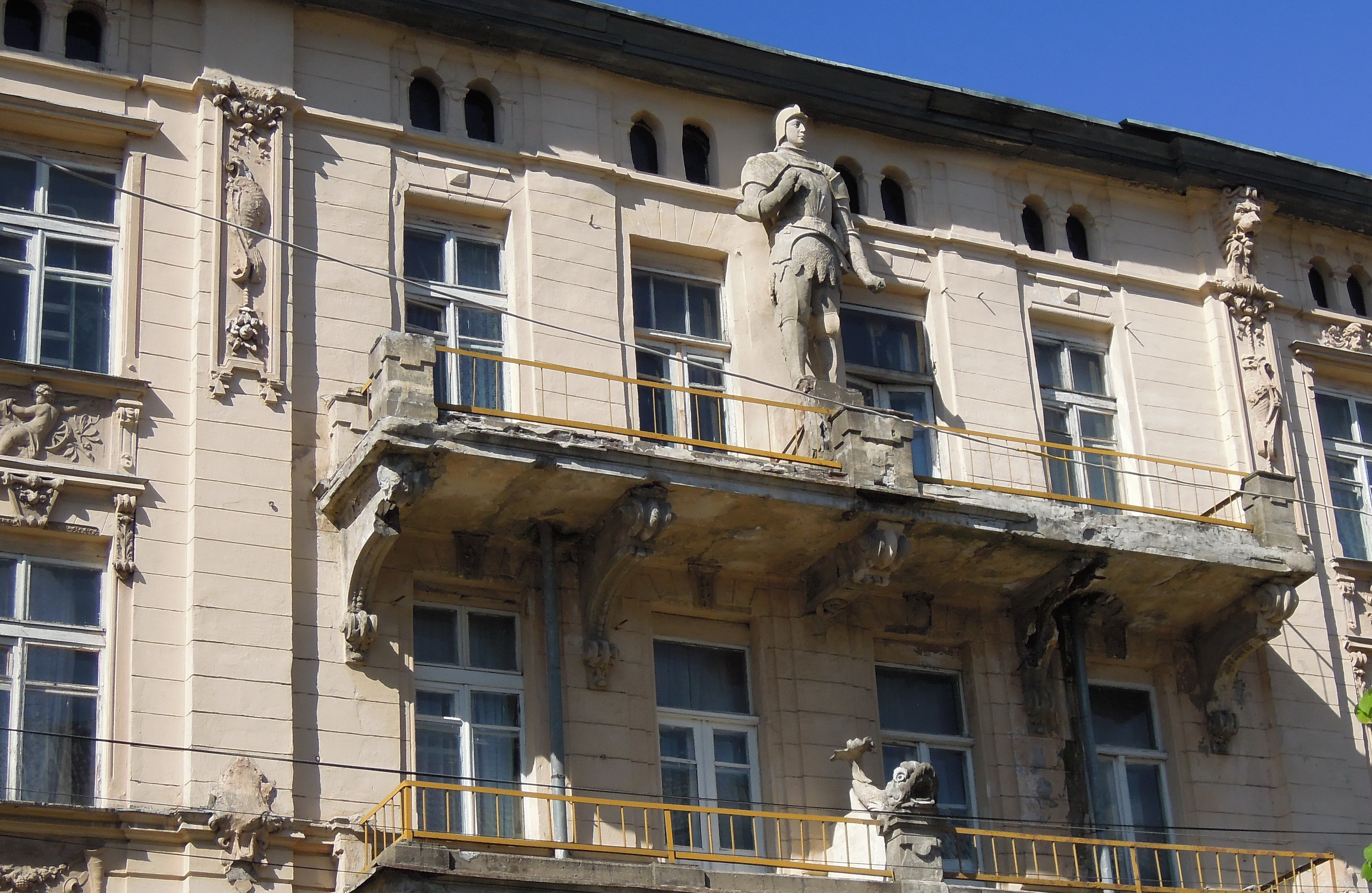 Скульптура рыцаря. г. Советск, Калининградская обл. Конец XIX века.